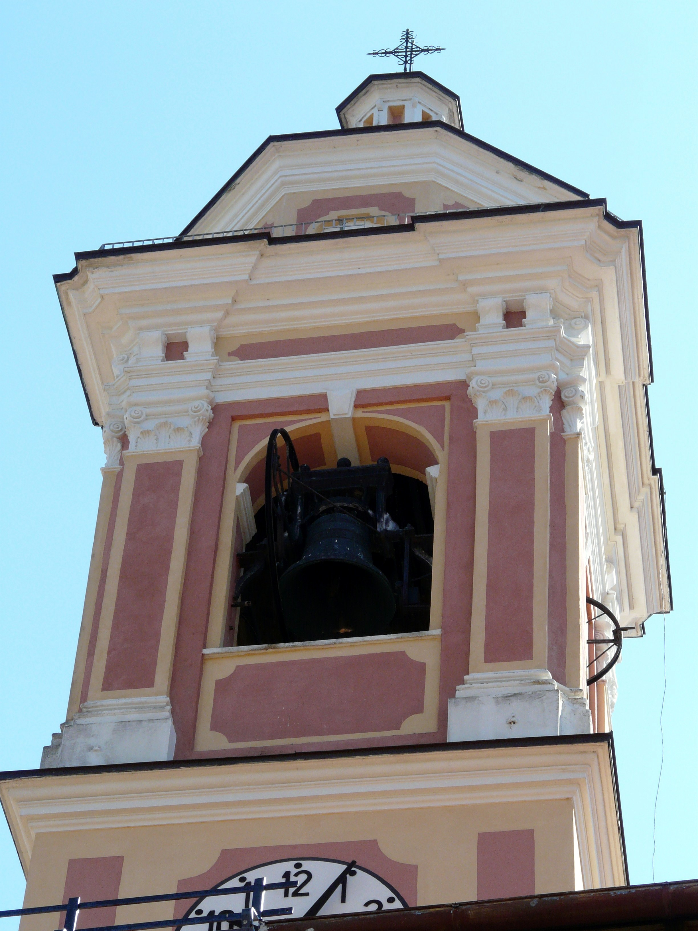 Il campanile della chiesa di San Giovanni Battista, Albera Ligure, Piemonte, Italia